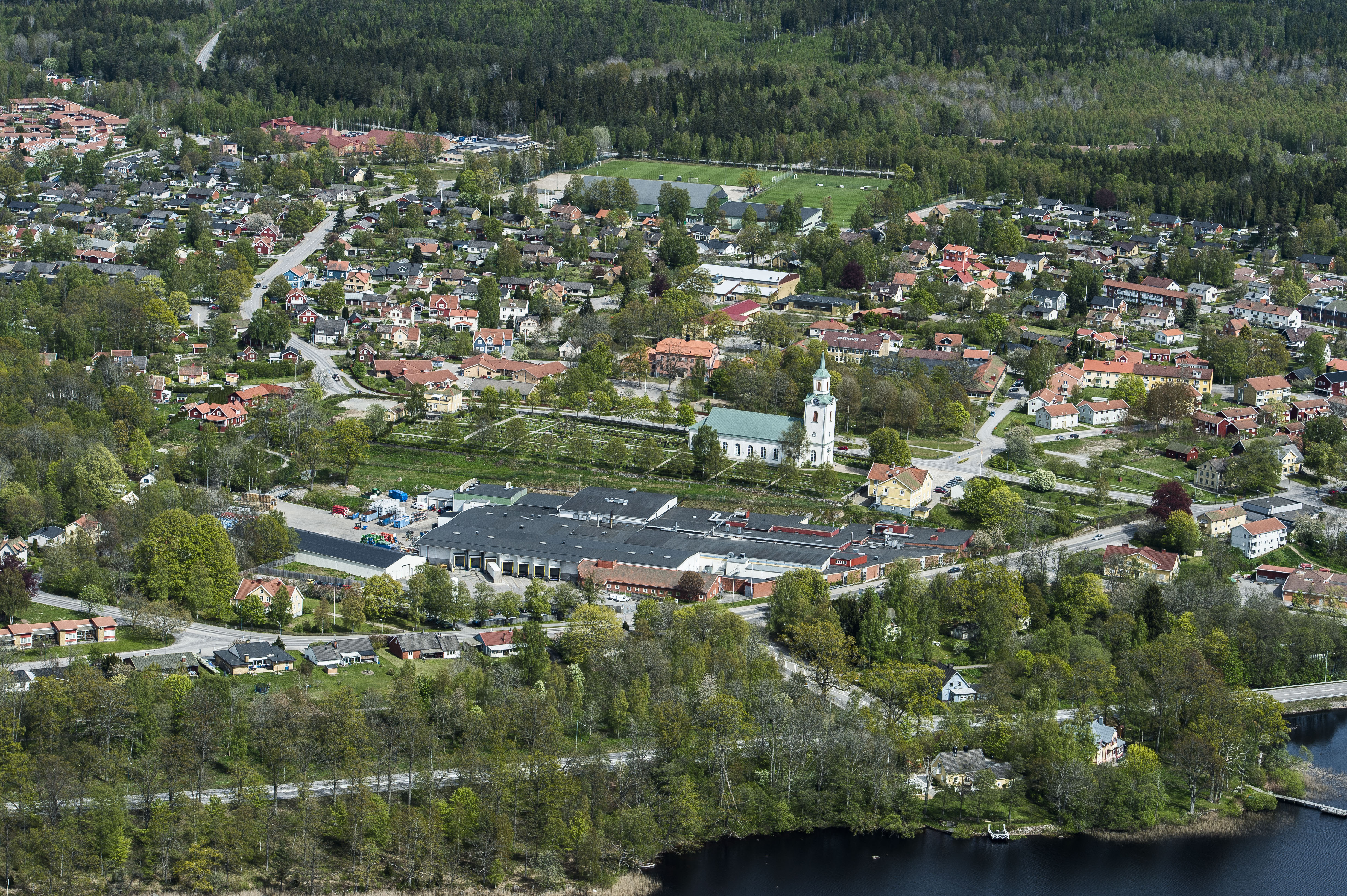 Tingsås ka